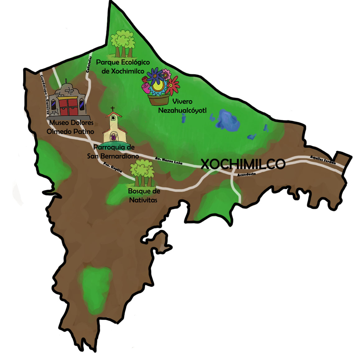 Mapa de la delegación de Xochimilco, mostrando los lugares y calles importantes.